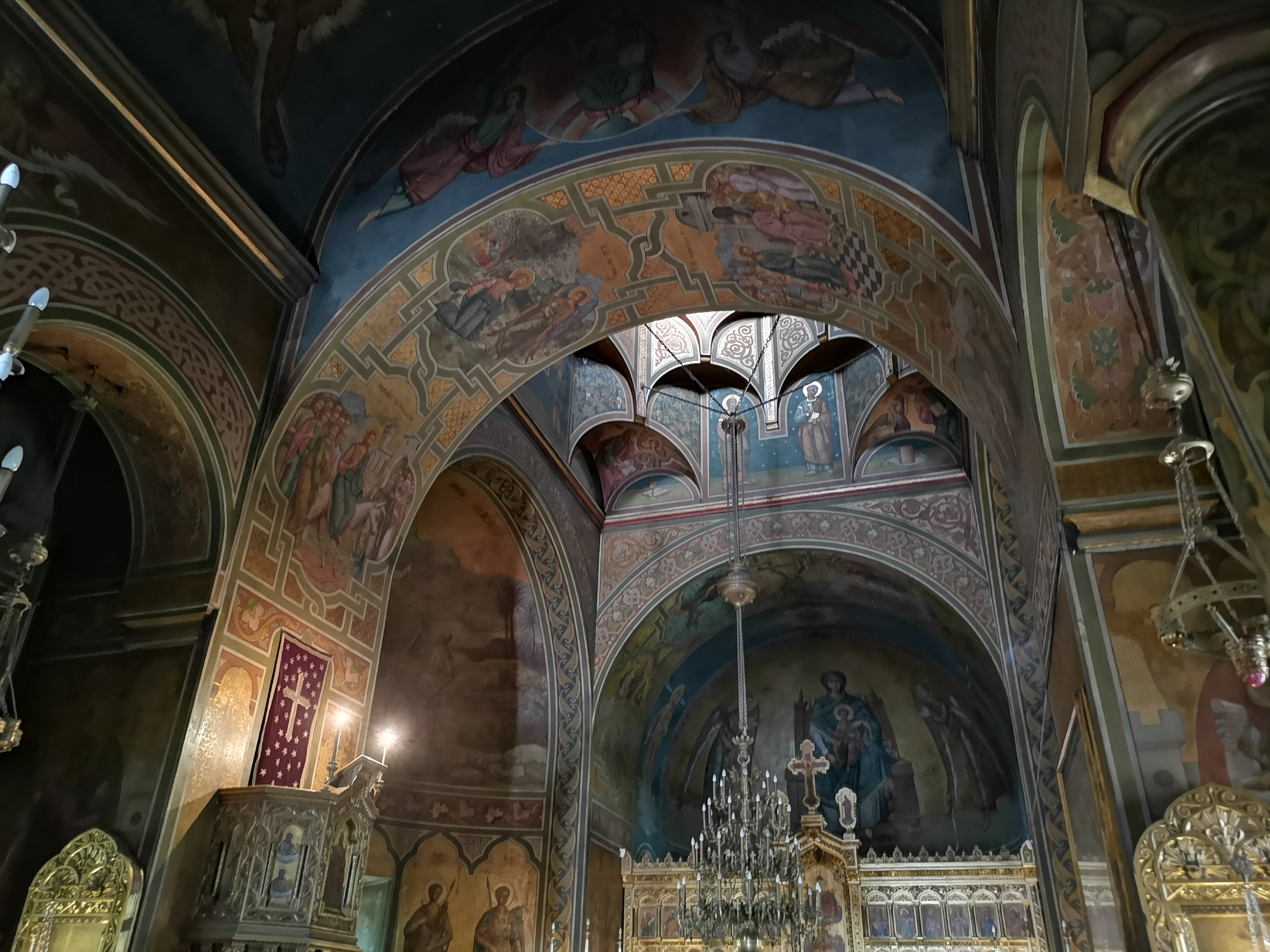 Manastirea Sinaia, fotografiata din interior